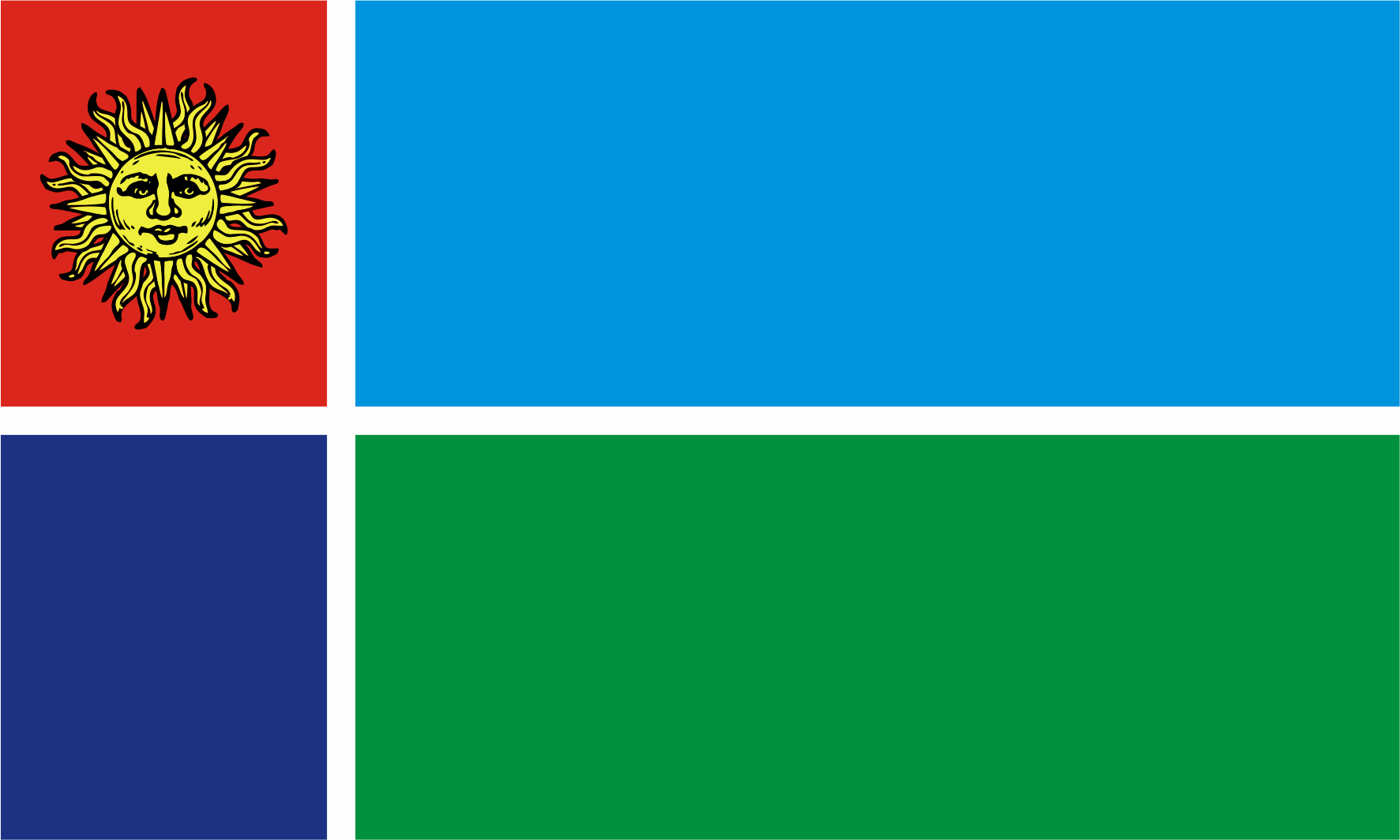 Bandera de Santa Isabel